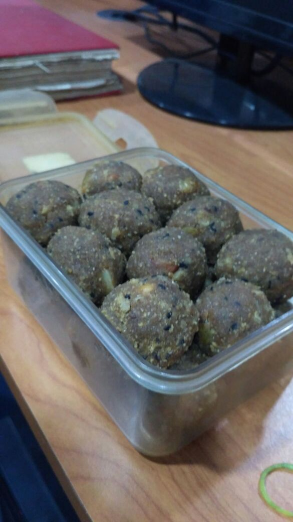 kerala sweets